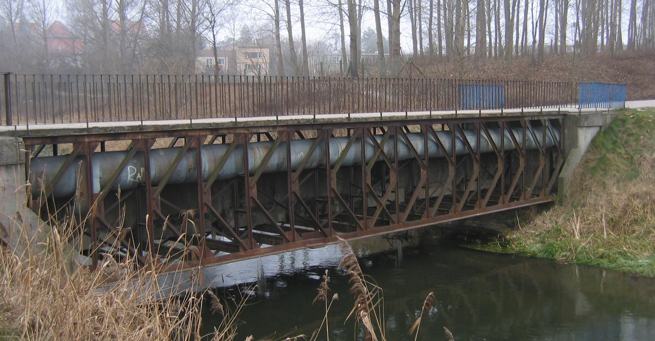 Most wschodni w ciągu ulicy Obrońców Tobruku